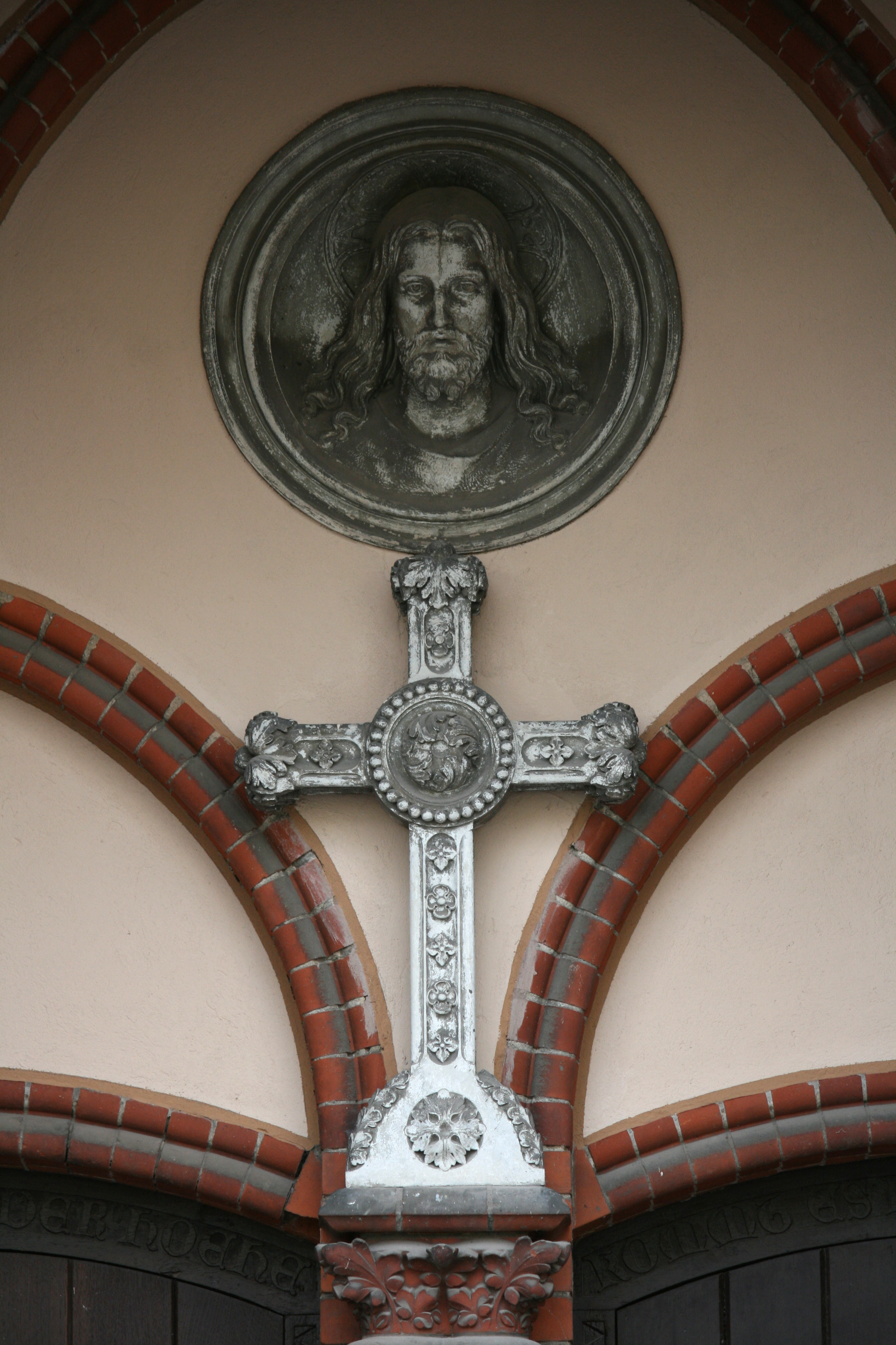 Portal der Erlöserkirche, Berlin